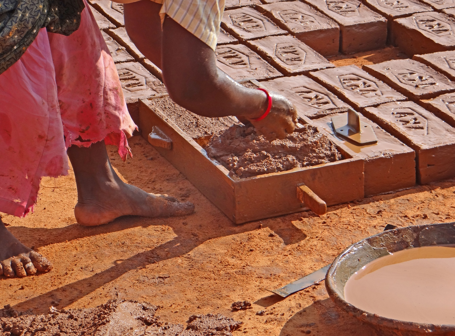 Femme en train de fabriquer une brique dans une briqueterie artisanale près de Kattakaruppanpatti sur la route en direction d'Usilampatti. Son mari à coté d'elle prépare la terre. Toute la journée, en plein soleil, par une chaleur de près de 40°, cette pauvre femme tasse de la terre dans des moules pour fabriquer des briques de terre crue de marque VKV qui seront ensuite séchées au soleil puis regroupées pour constituer un énorme fourneau dans lequel un feu de bois sera allumé pour les faire cuire.